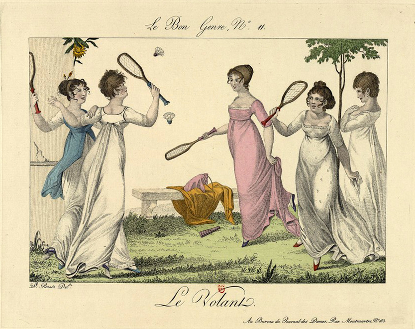 Gravure coloriée à la main de la série Le Bon Genre publiée par Pierre de la Mésangère.